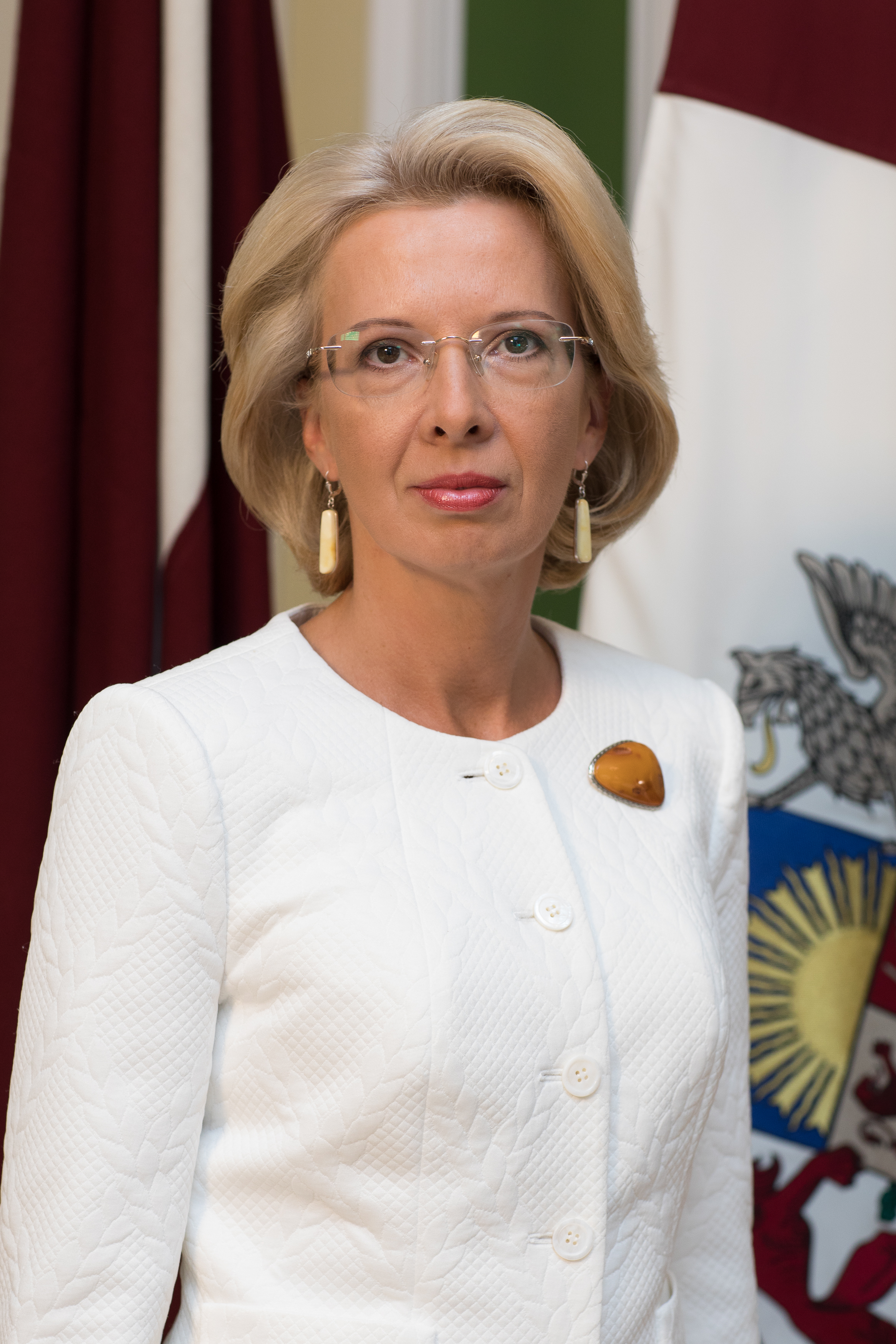 12.Saeimas priekšsēdētāja Ināra Mūrniece. Foto: Ernests Dinka, Saeima Izmantošanas noteikumi: saeima.lv/lv/autortiesibas